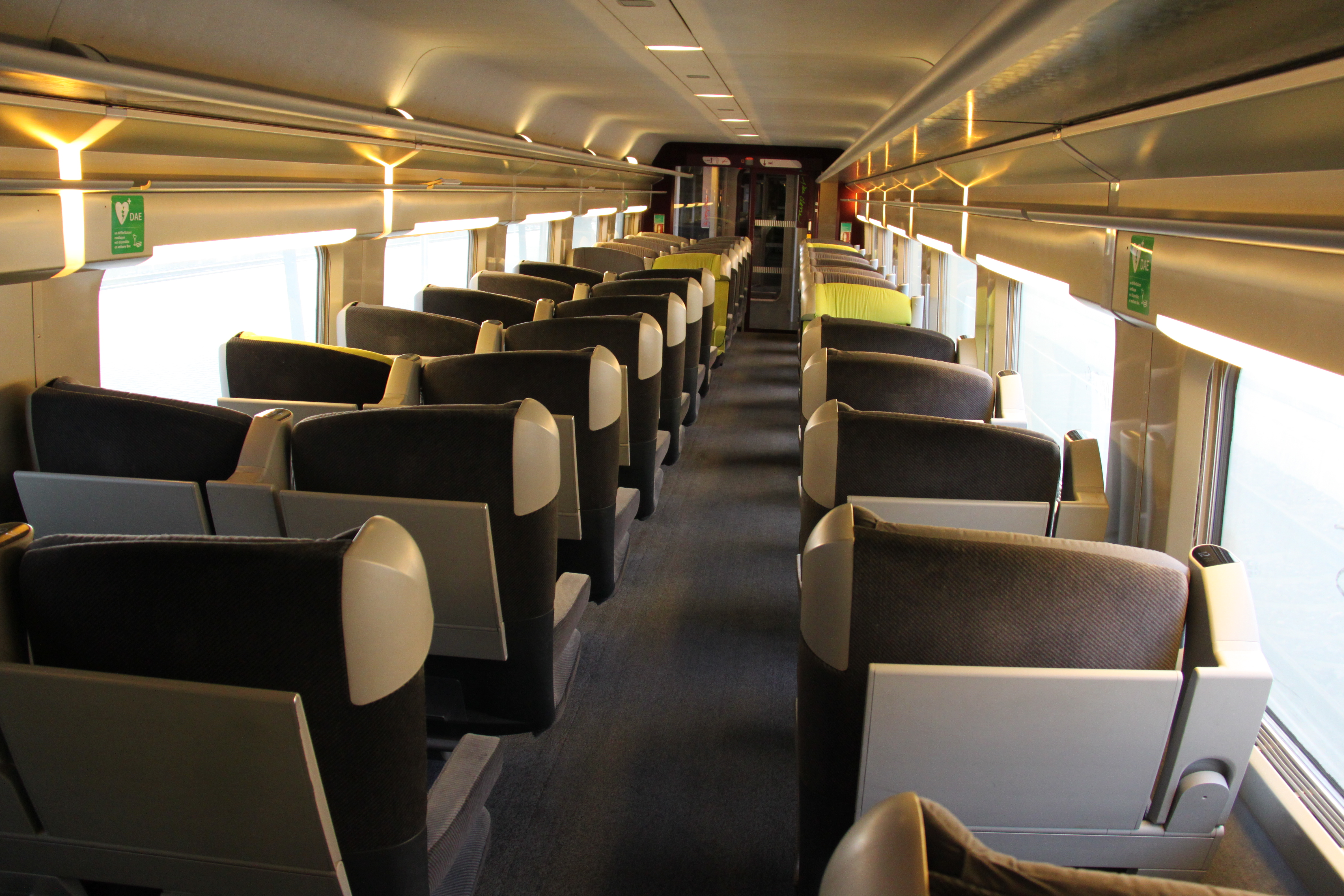 Interieur eerste klasse van een TGV in de Lacroix-uitvoering.